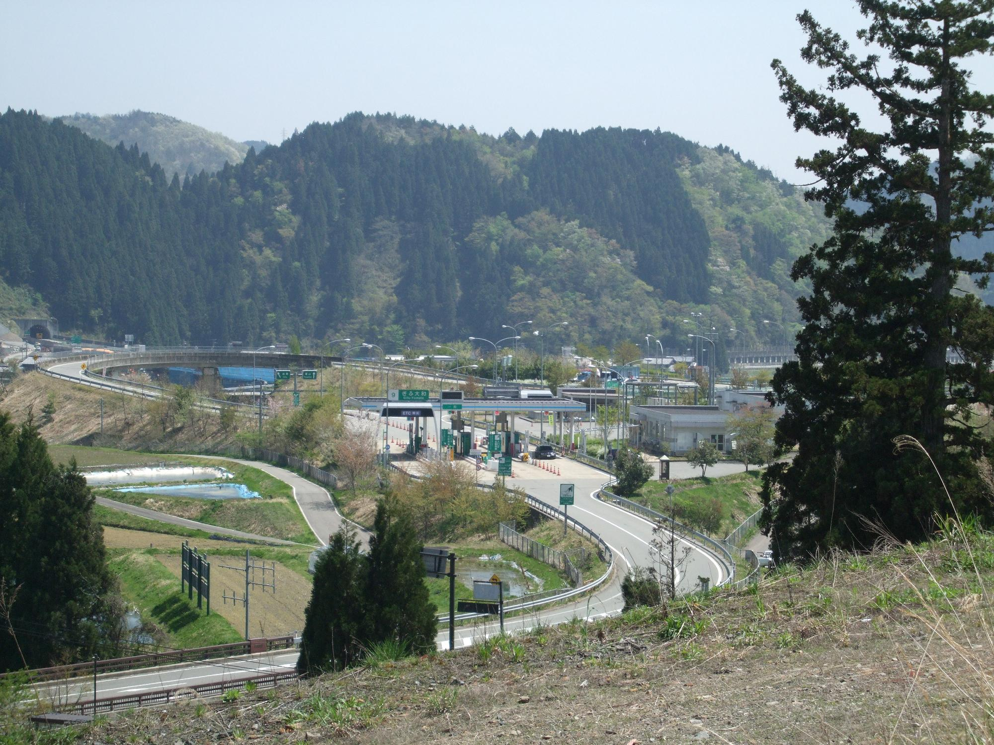 東海北陸自動車道 ぎふ大和インターチェンジ （左に見えるトンネルは神路トンネル・一宮方面） 2008.4.22 投稿者が撮影